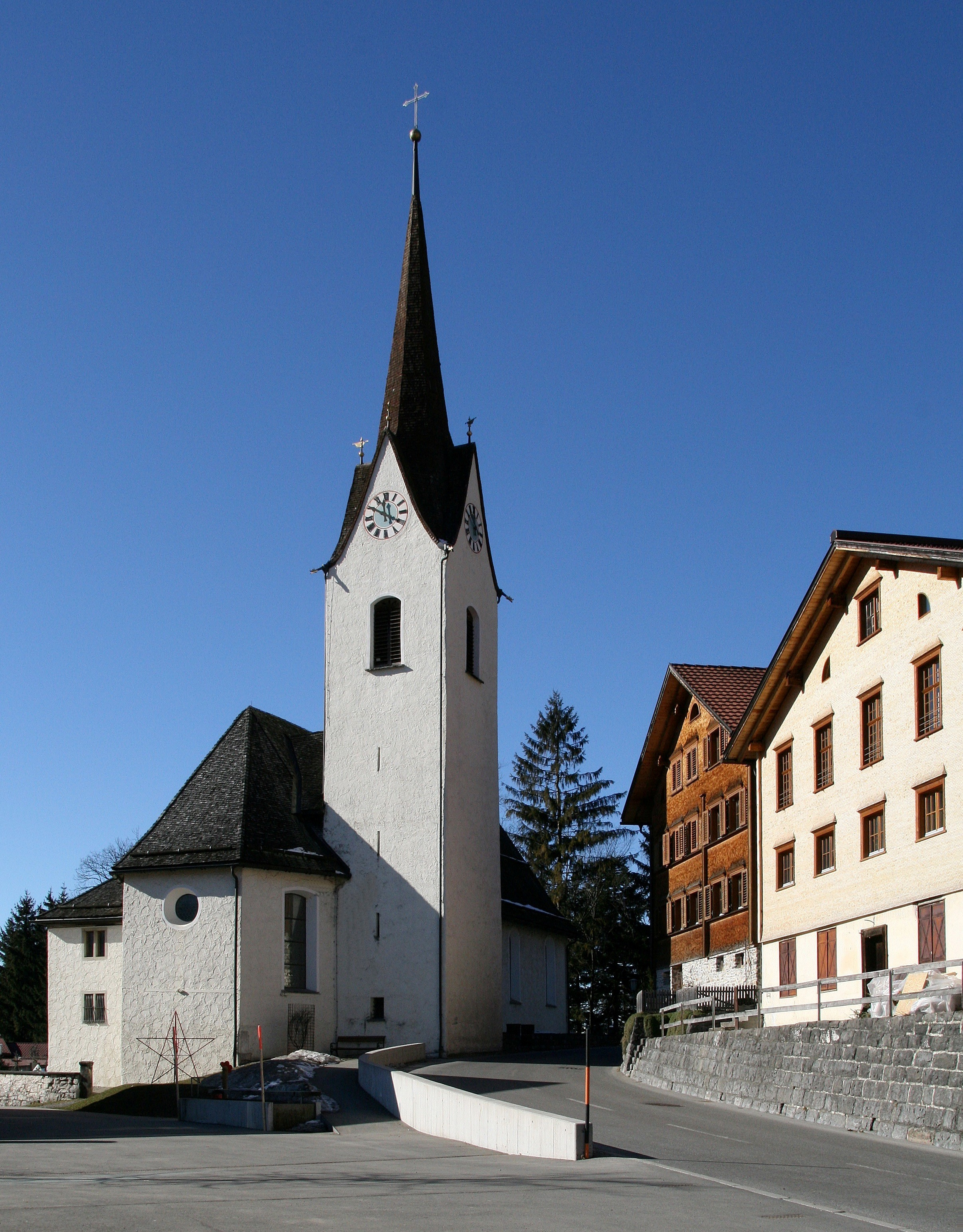 Pfarrkirche "Zu Unserer Lieben Frau Unbefleckte Empfängnis" in Blons im grossen Walsertal, Vorarlberg.